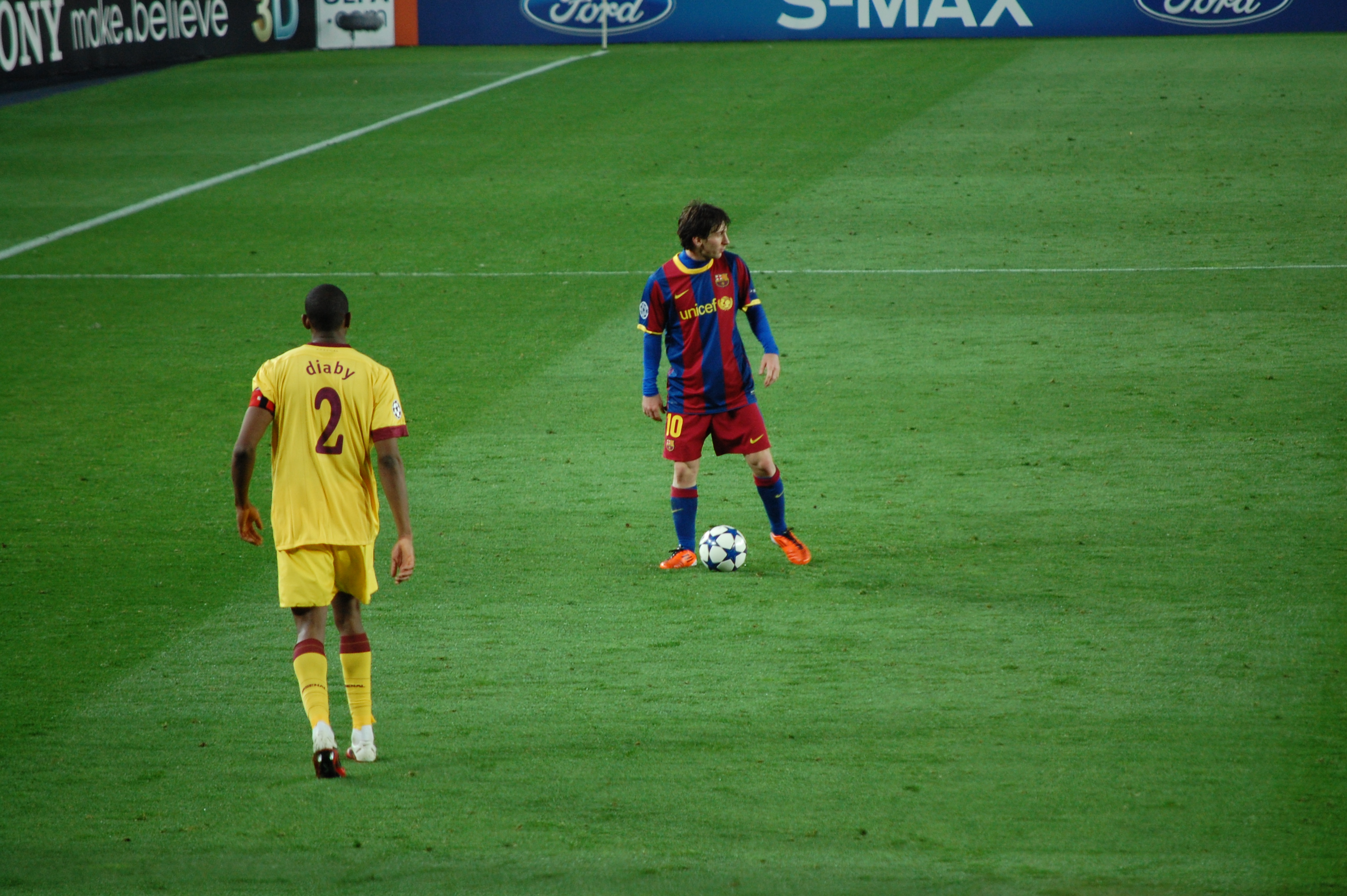 Lionel Messi